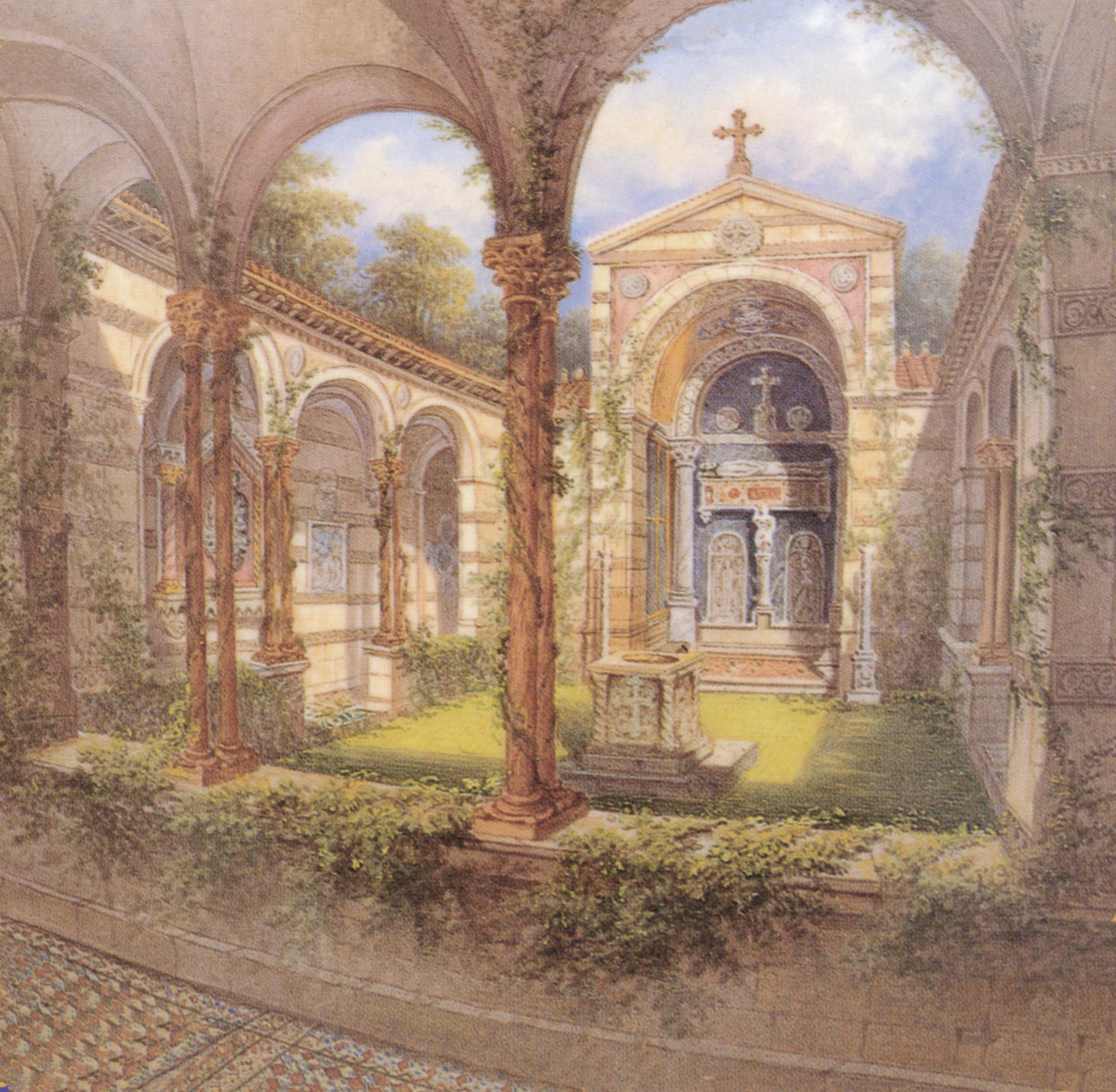 Vasenbild